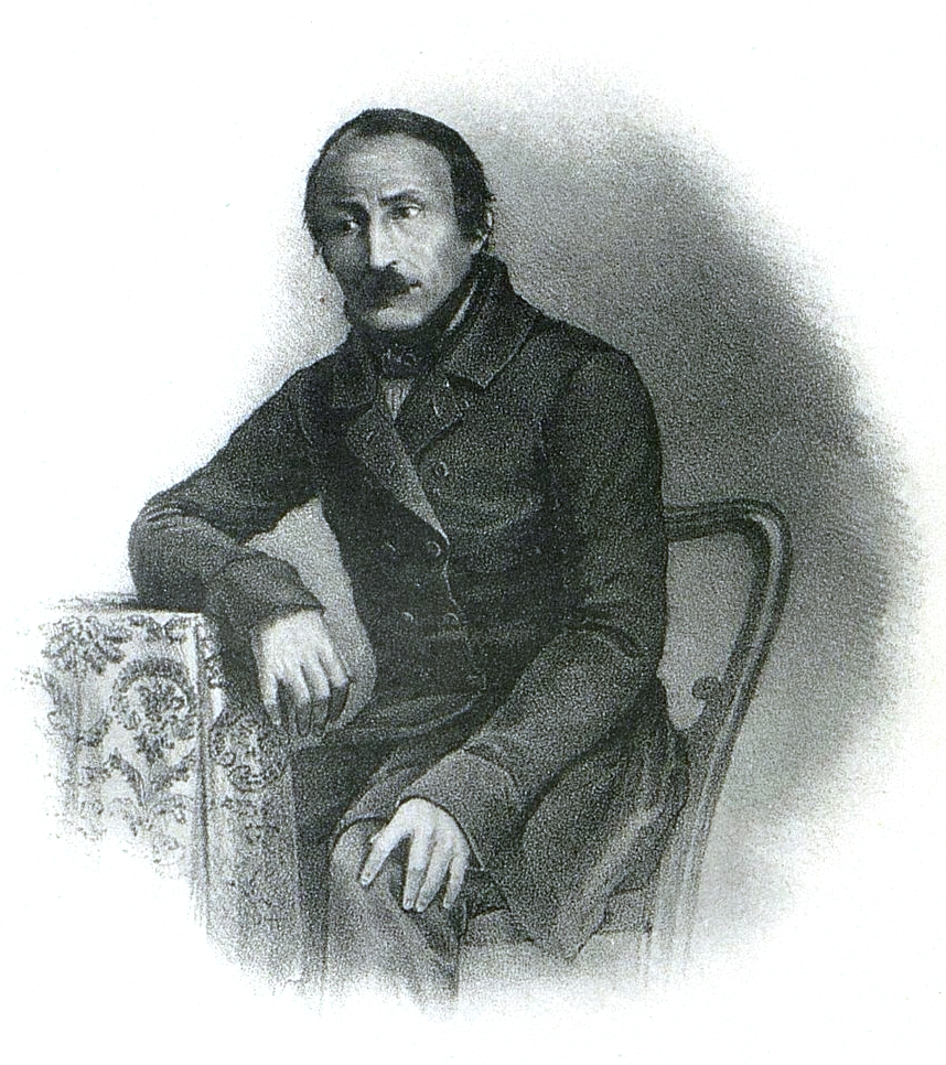 Борисов, Андрей Иванович